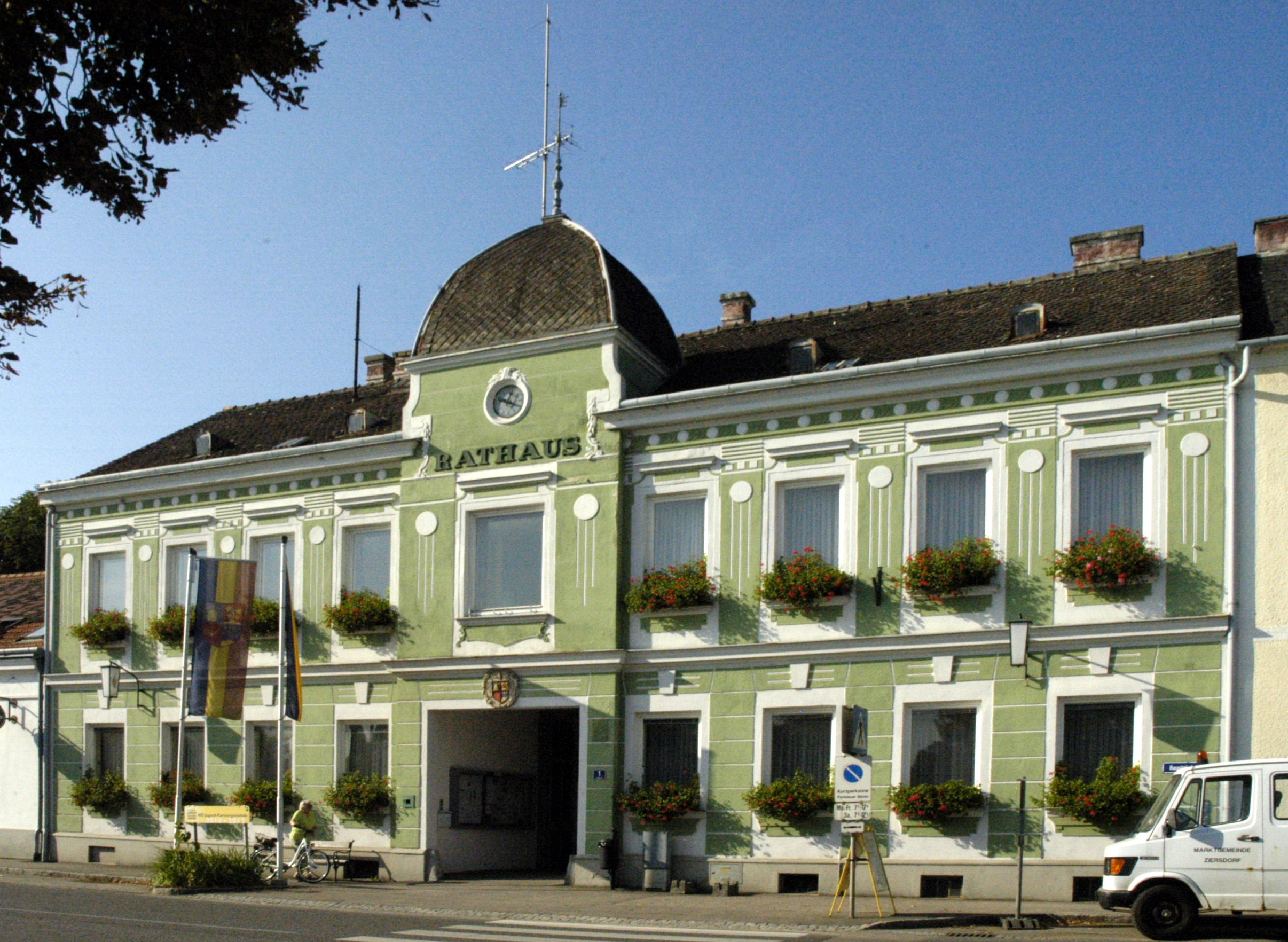 Rathaus in Ziersdorf